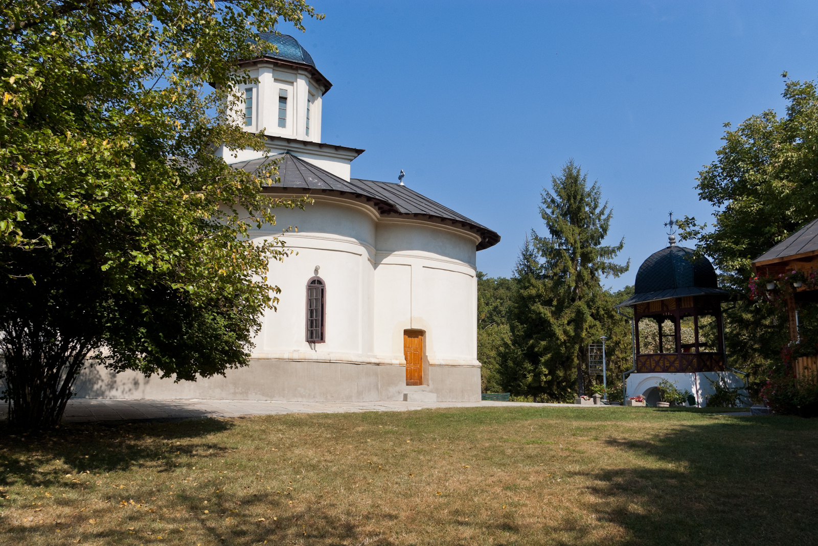 Fotografia prezinta biserica din incinta Schitului Trivale, vazuta dinspre S si parcul din jurul acesteia 04